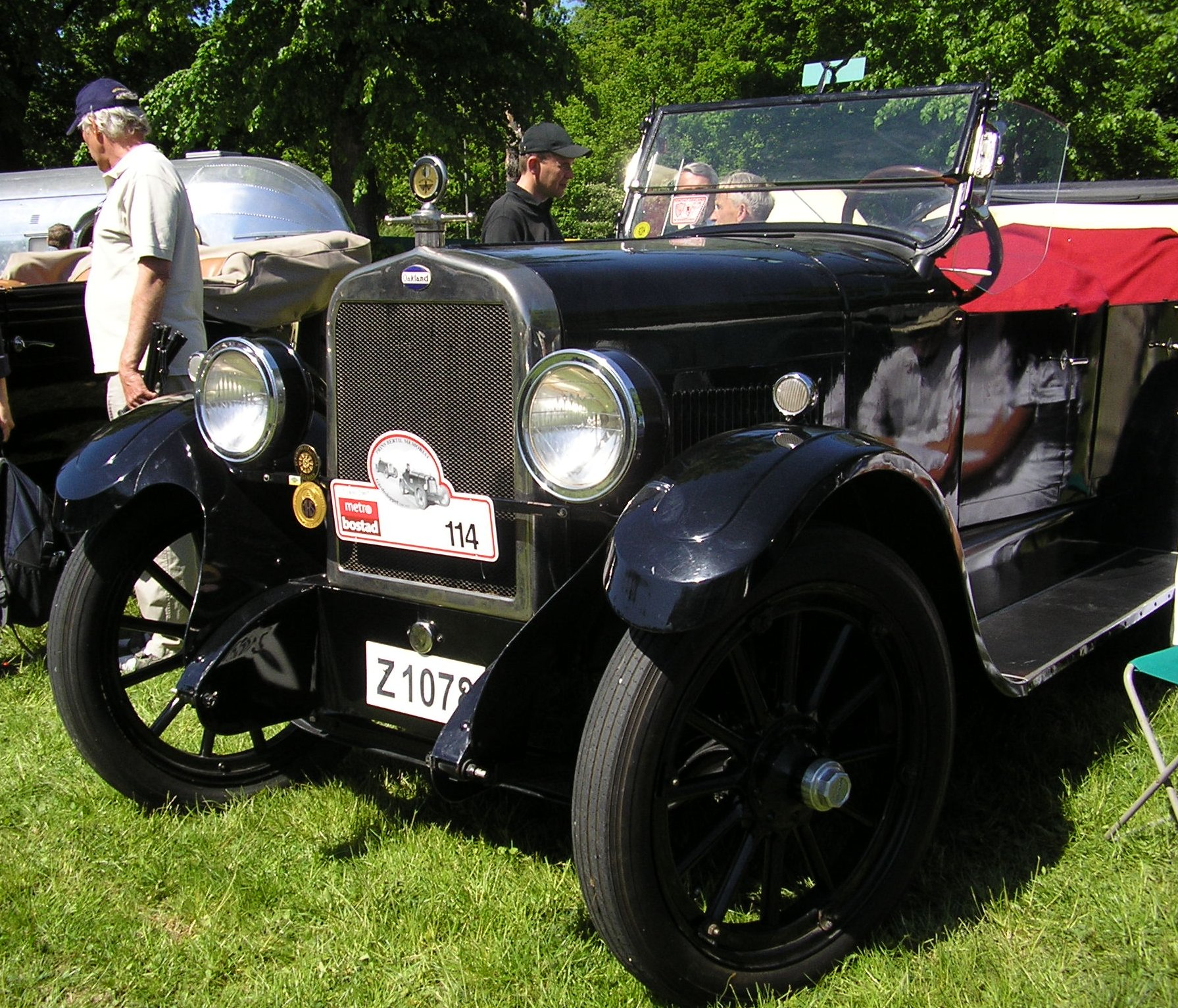 1923 Oakland